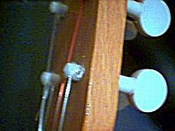 Gros plan de la tête d'un ukulélé à chevilles en plastique